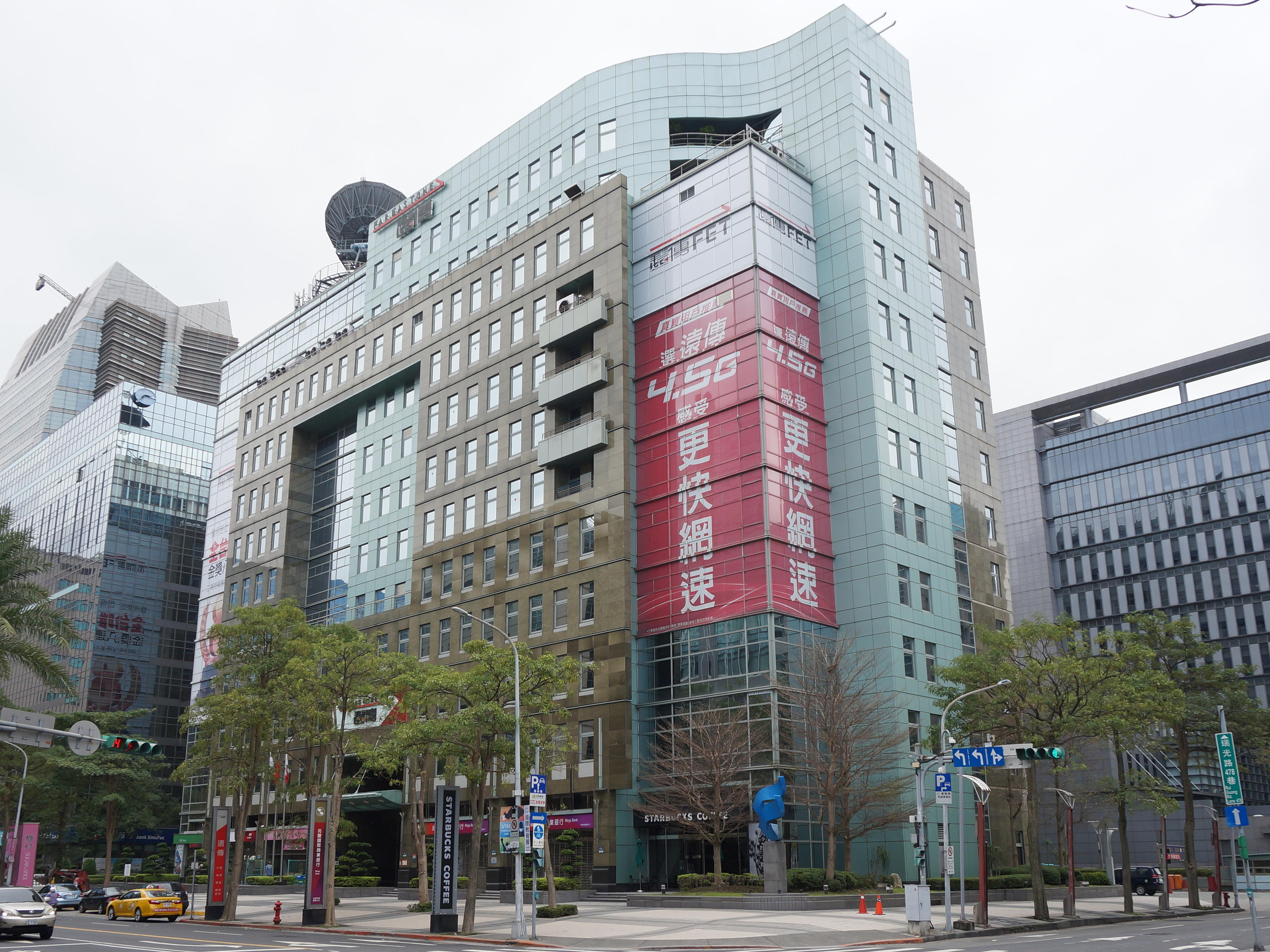 遠傳電信總部右前方外觀。